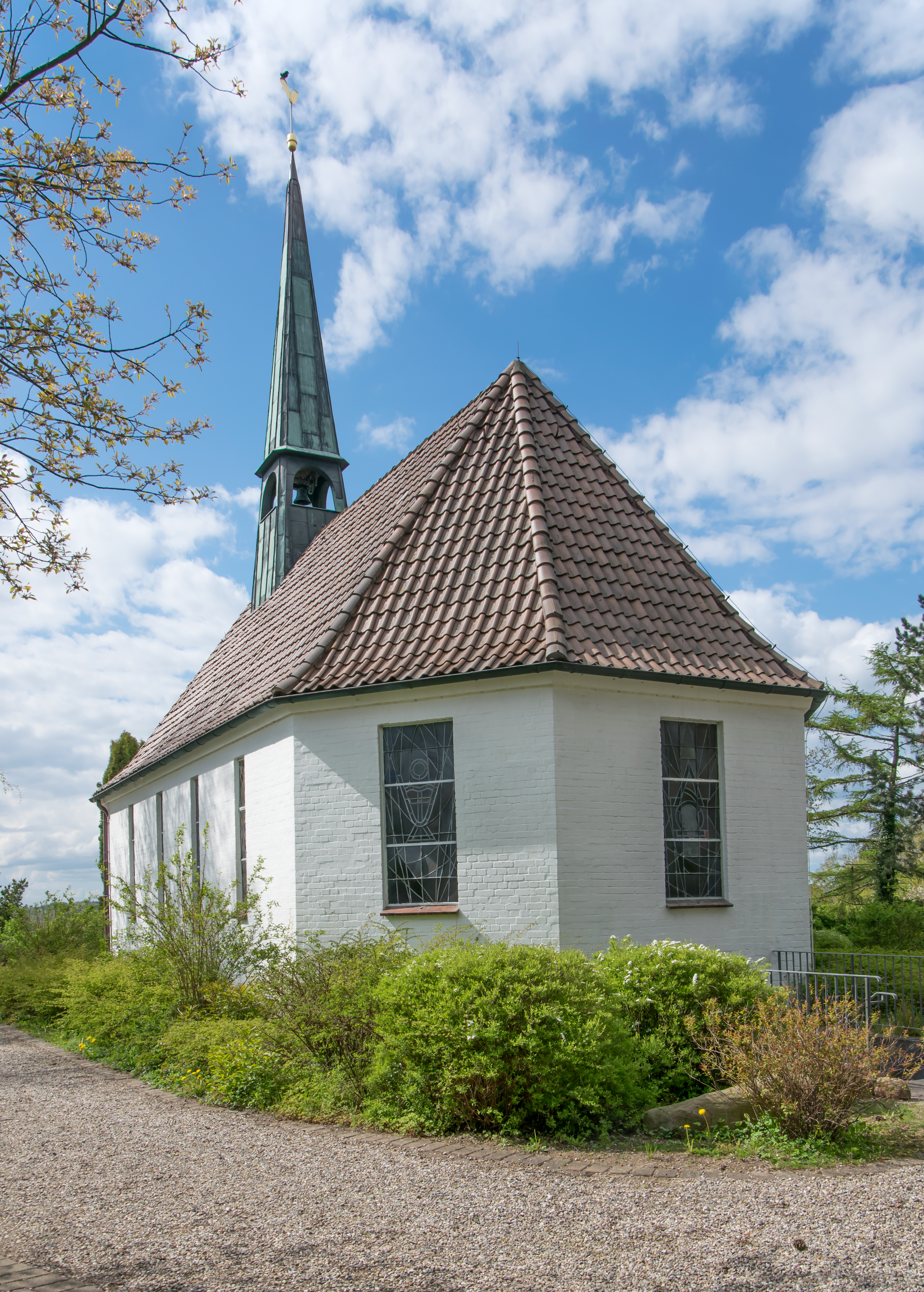 Niederkleveez Kapelle